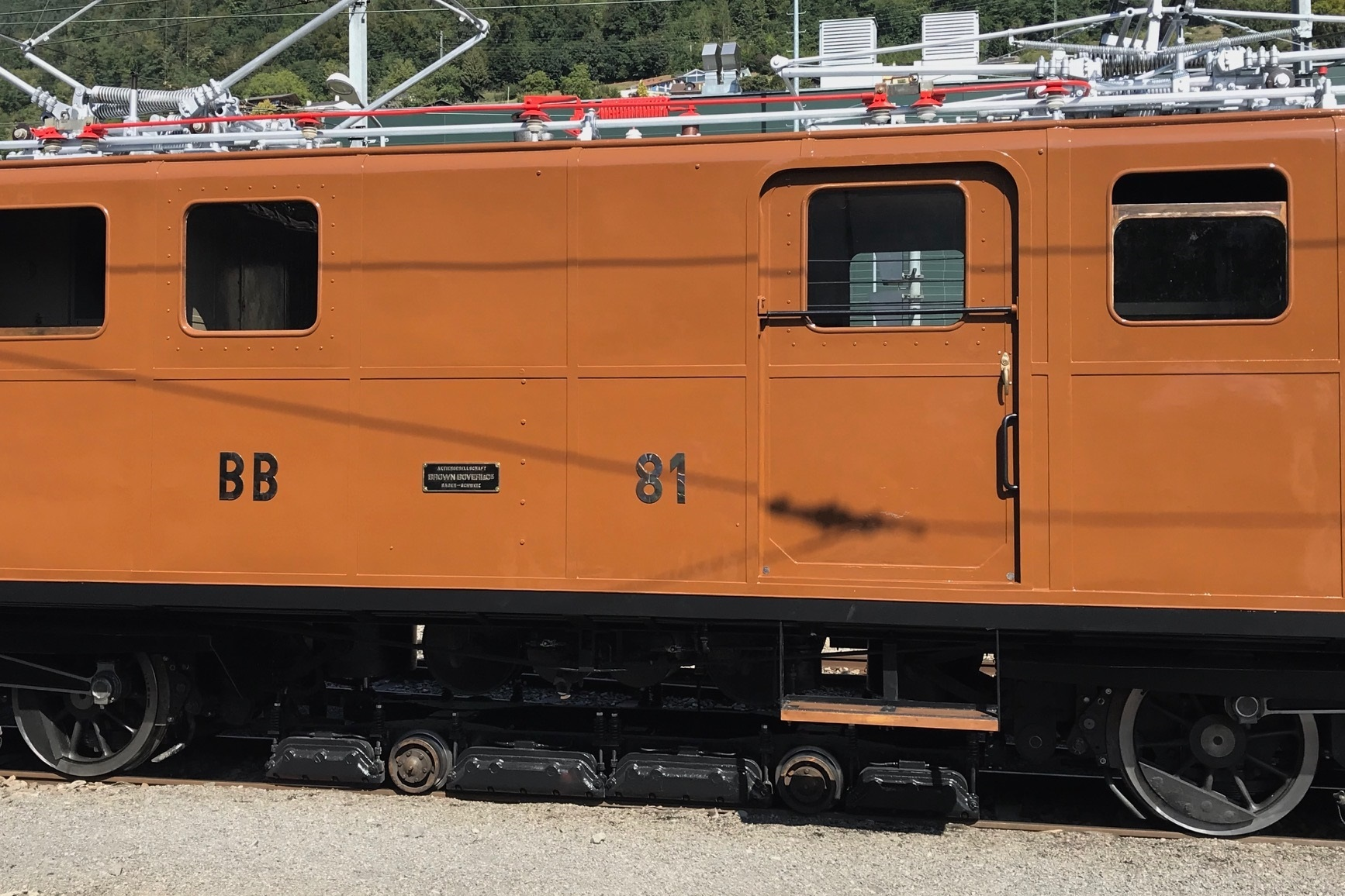 Seitenansicht mit Magnetschienen-Wagen der sich seit 1970 im Besitz der Museumsbahn Blona-Chamby (BC) befindende Ge 4/4 81 der ehemaligen Berninabahn (BB) frisch refidiert in Blonay. Die Elektrolokomotive ist wieder mit der ursprünglich mit der Nummer 81 versehen. Zwischen 1961 und 2018 war sie mit der Nummer 181 bezeichnet. Abgeliefert wurde die Lokomotive 1916 als Ge 6/6. In eine Ge 4/4 umgebaut wurde die Lokomotive 1929. Mit der Fusion der Berninabahn und der Rhätischen Bahn (RhB) 1943 gehörte die Lokomotive über länger Zeit der Rhätischen Bahn.